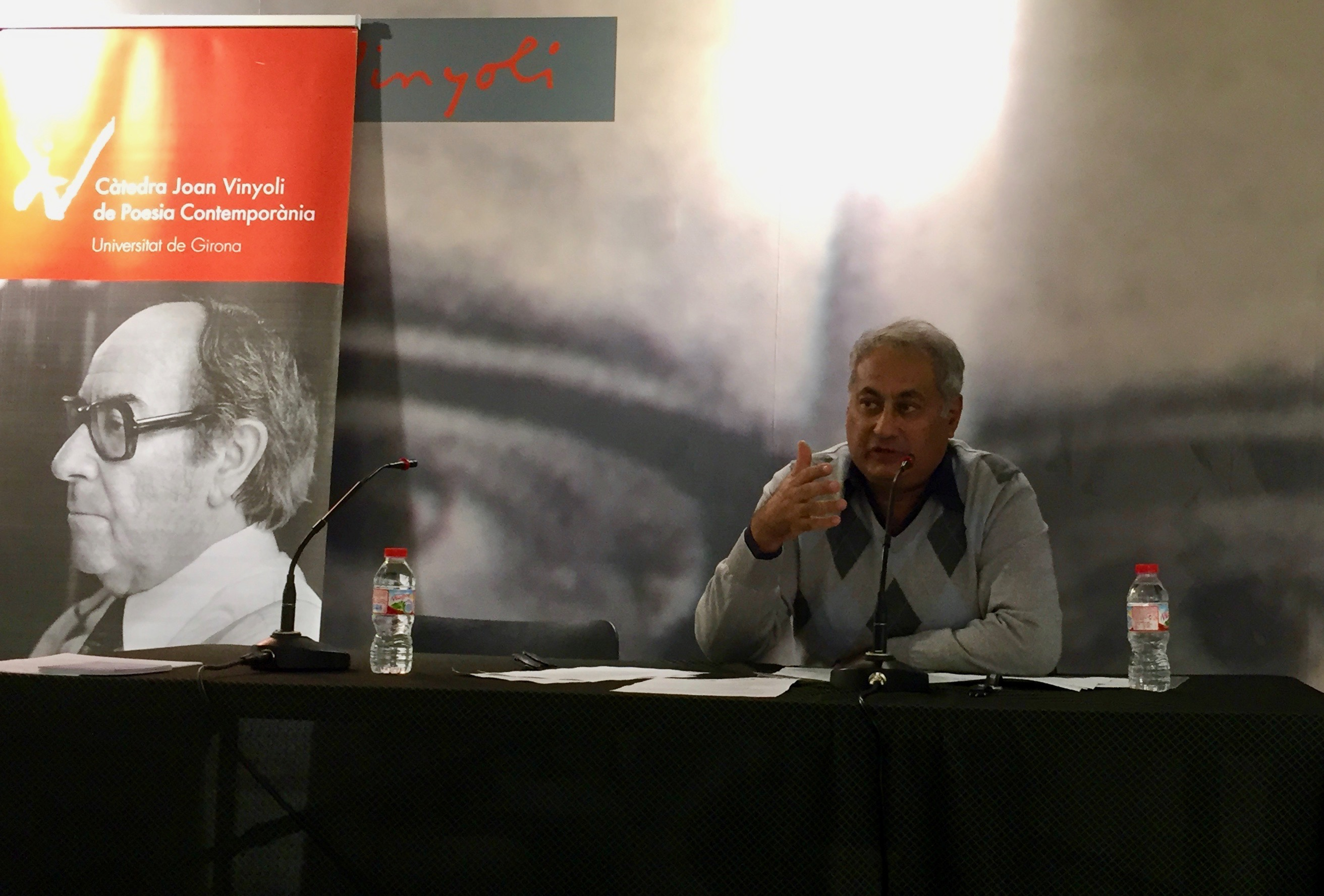 Conferència inaugural al Col·loqui de Tardor celebrat a Santa Coloma de Farners el novembre del 2018.